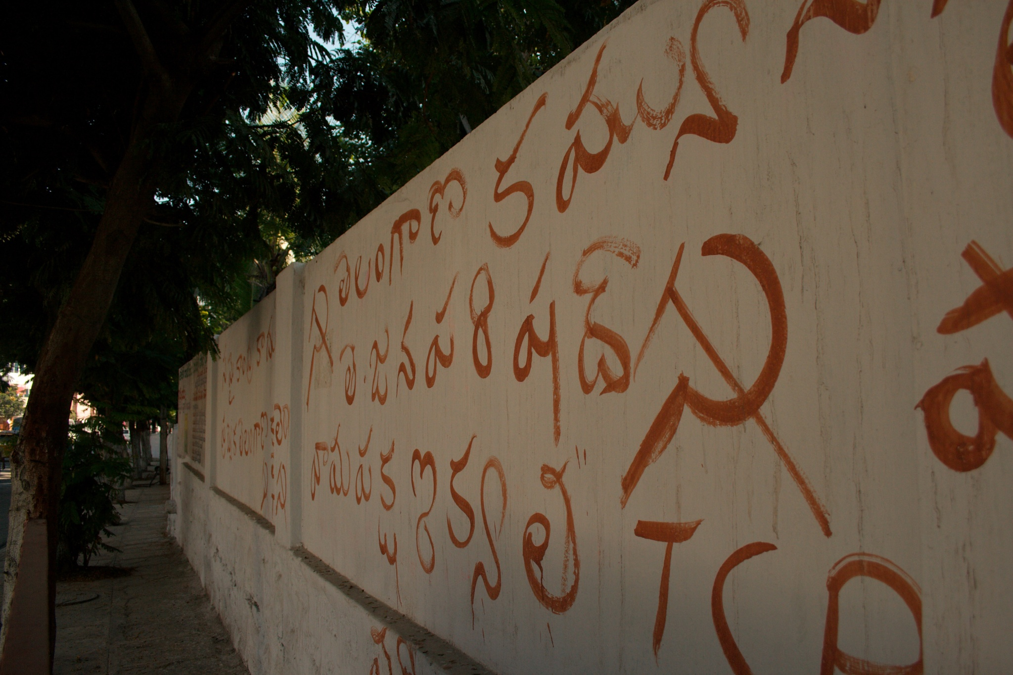 Telangana Communist Party in Hyderabad. Language: Telugu.